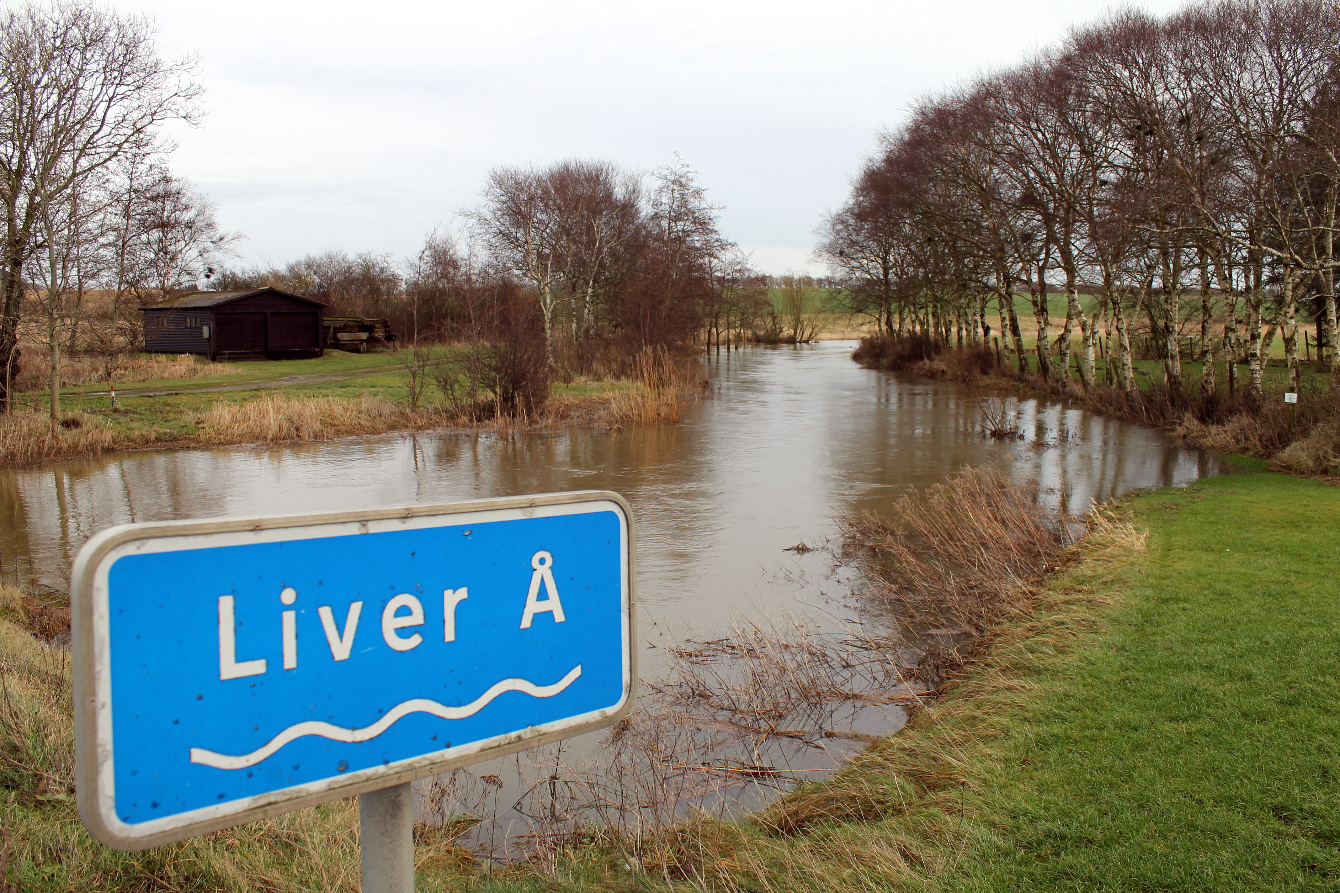 Liver Å, Hjørring Kommune